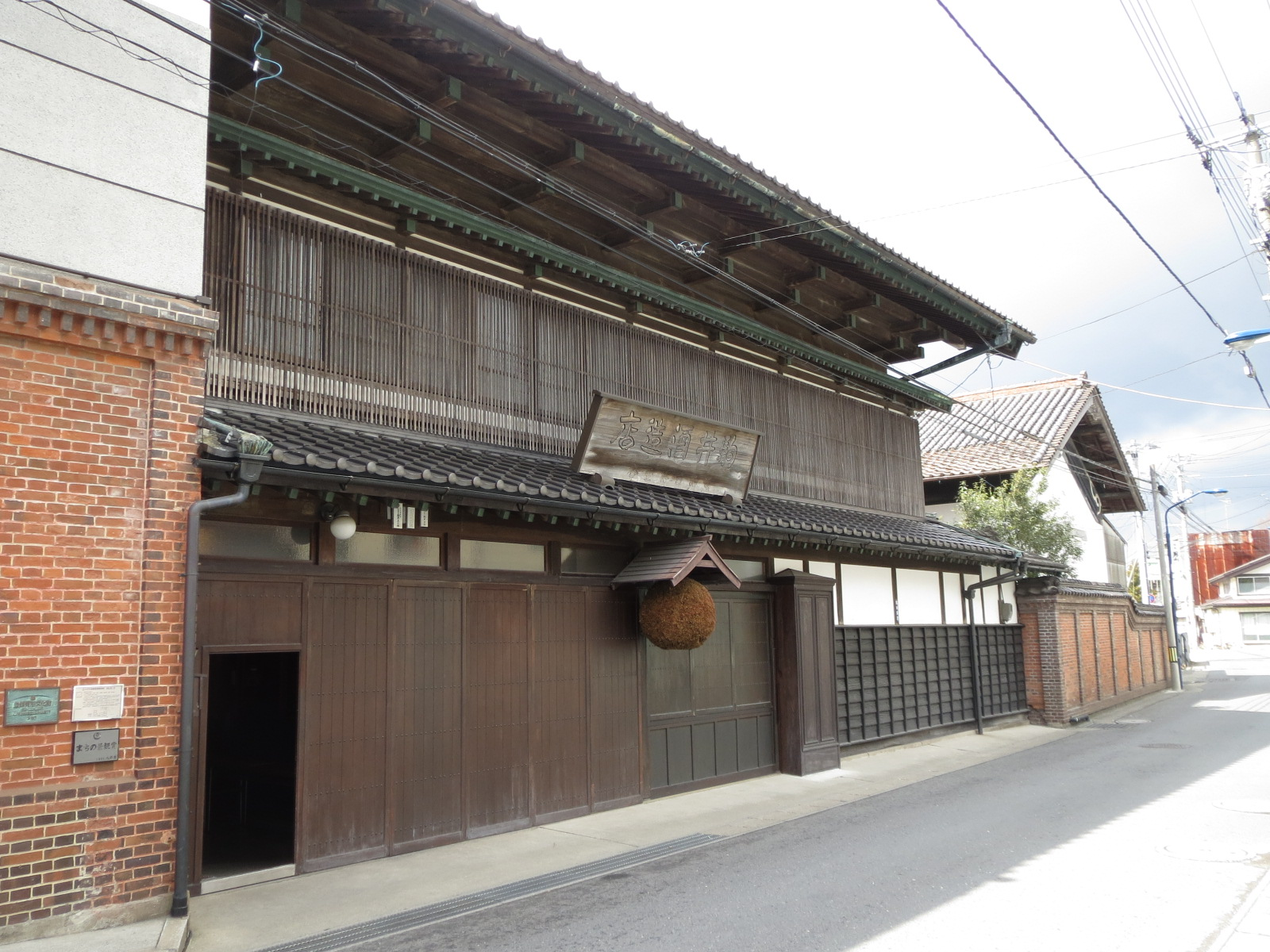 八戸酒造店舗 Canon IXY 3